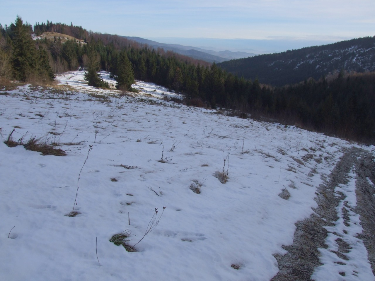 Nowa Polana w Gorcach. Widok na Magorzycę i dolinę potoku Głębieniec